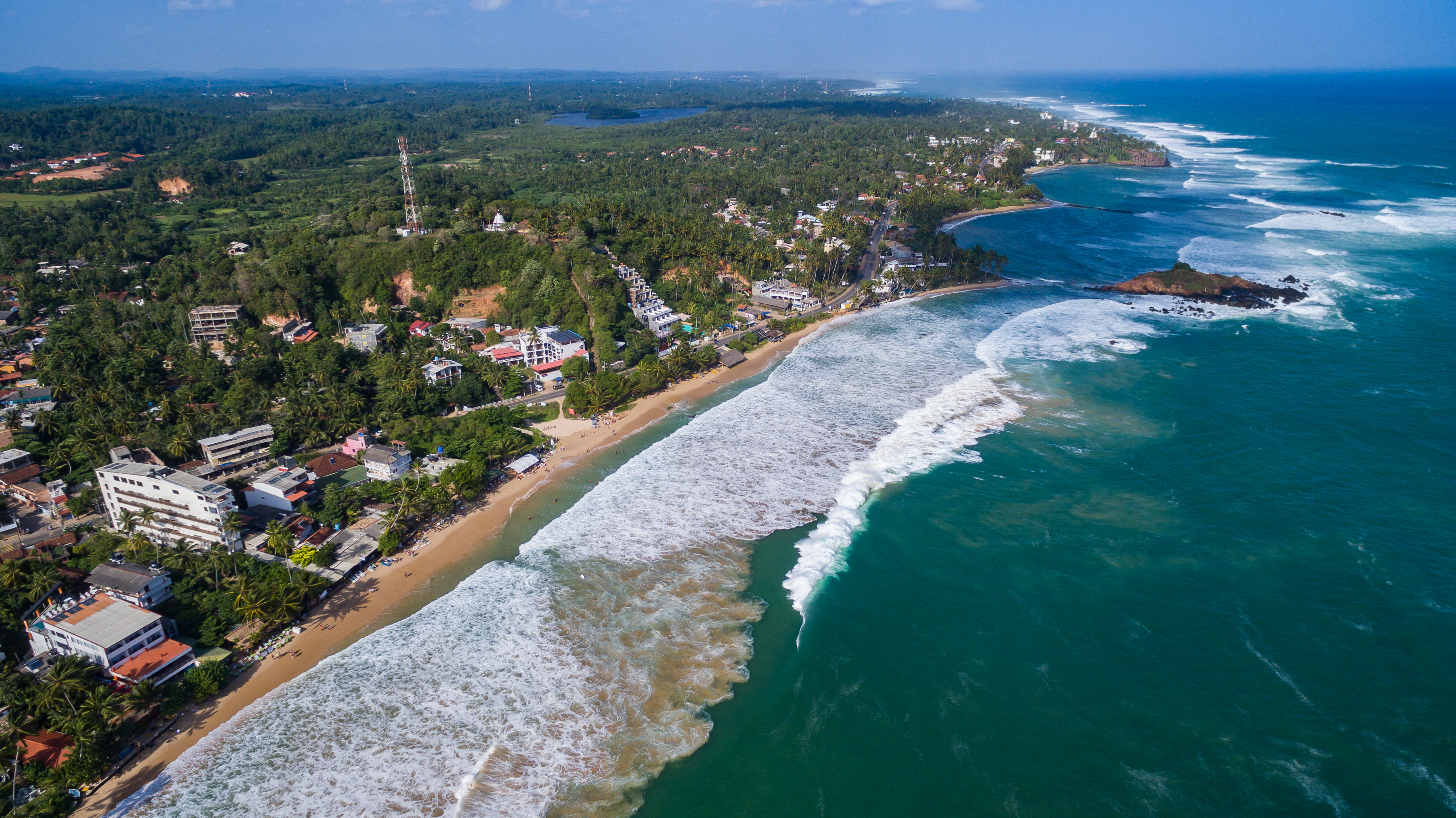 Mirissa Strand Luftbild